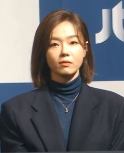 16일 오후 서울시 강남구 논현동 임피리얼팰리스서울 호텔에서 JTBC 새 월화드라마 '검사내전' 제작발표회가 열려 배우 이선균X정려원X이성재X김광규X이상희X전성우가 참석해 기자 질의 응답을 하고 있다.